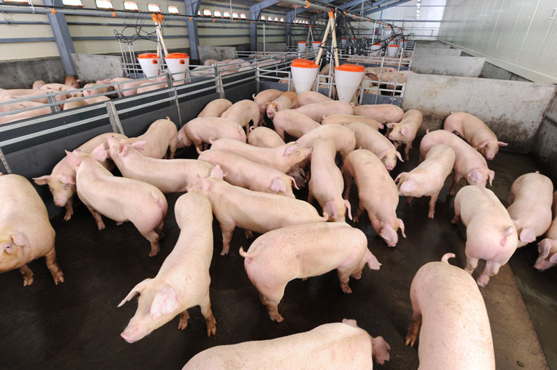 Свиньи